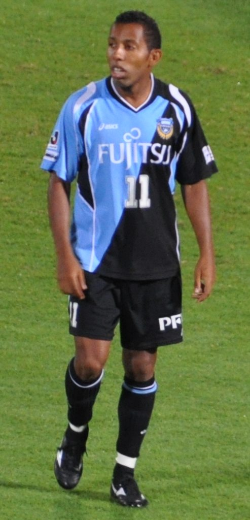 Kawasaki Frontale vs Gamba Osaka_176